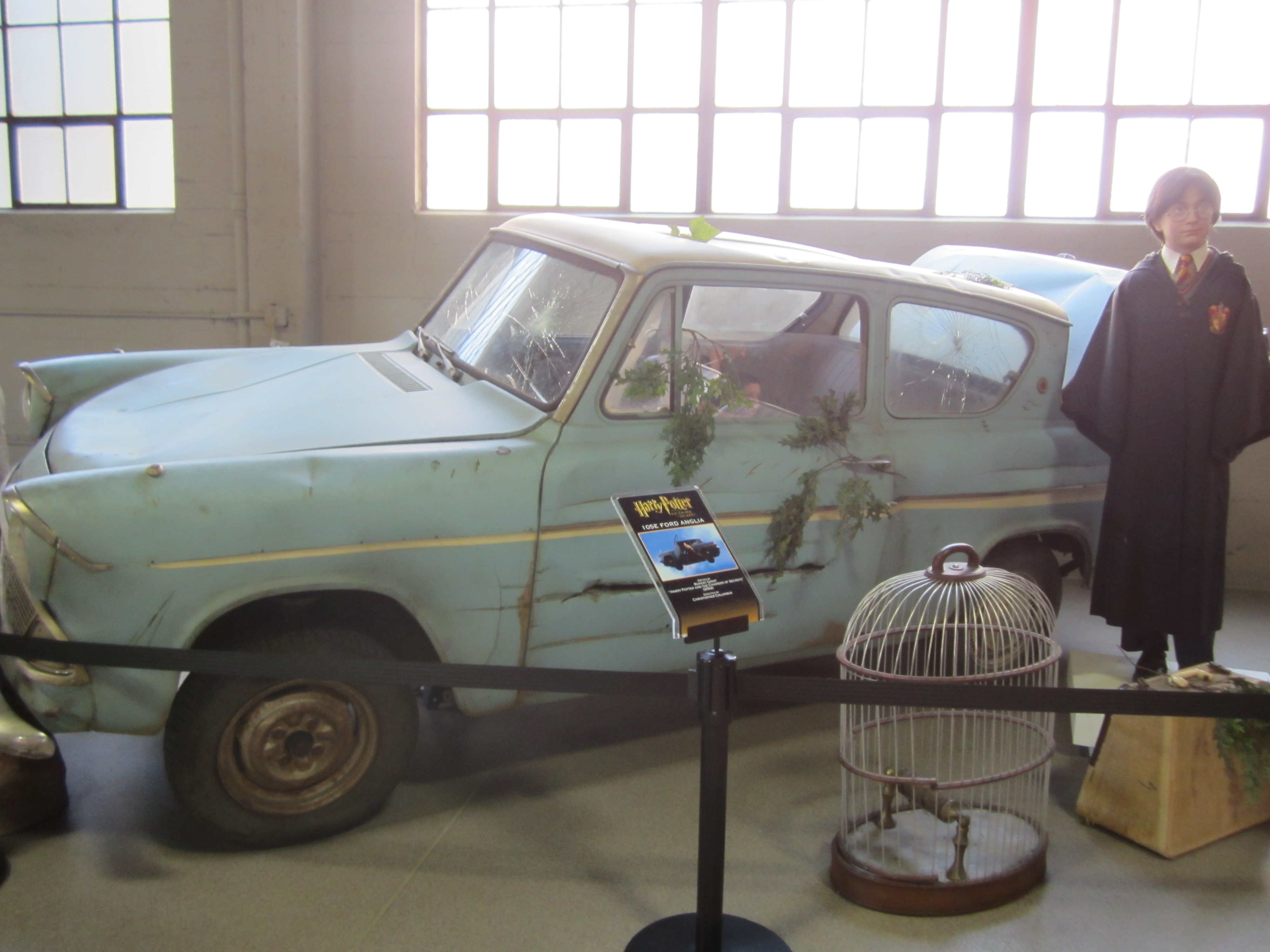 Voiture du film Harry Potter